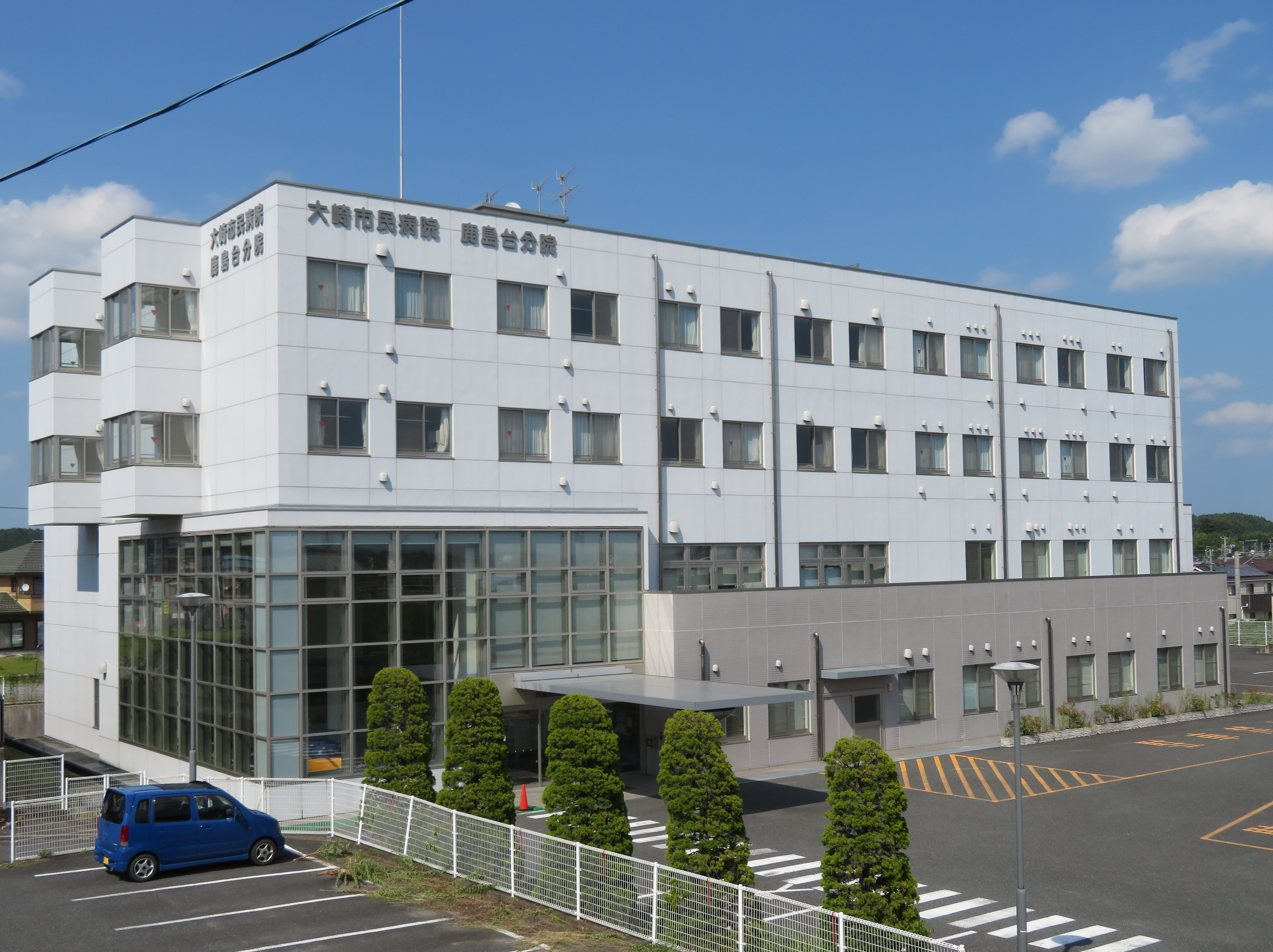 宮城県に所在する大崎市民病院鹿島台分院